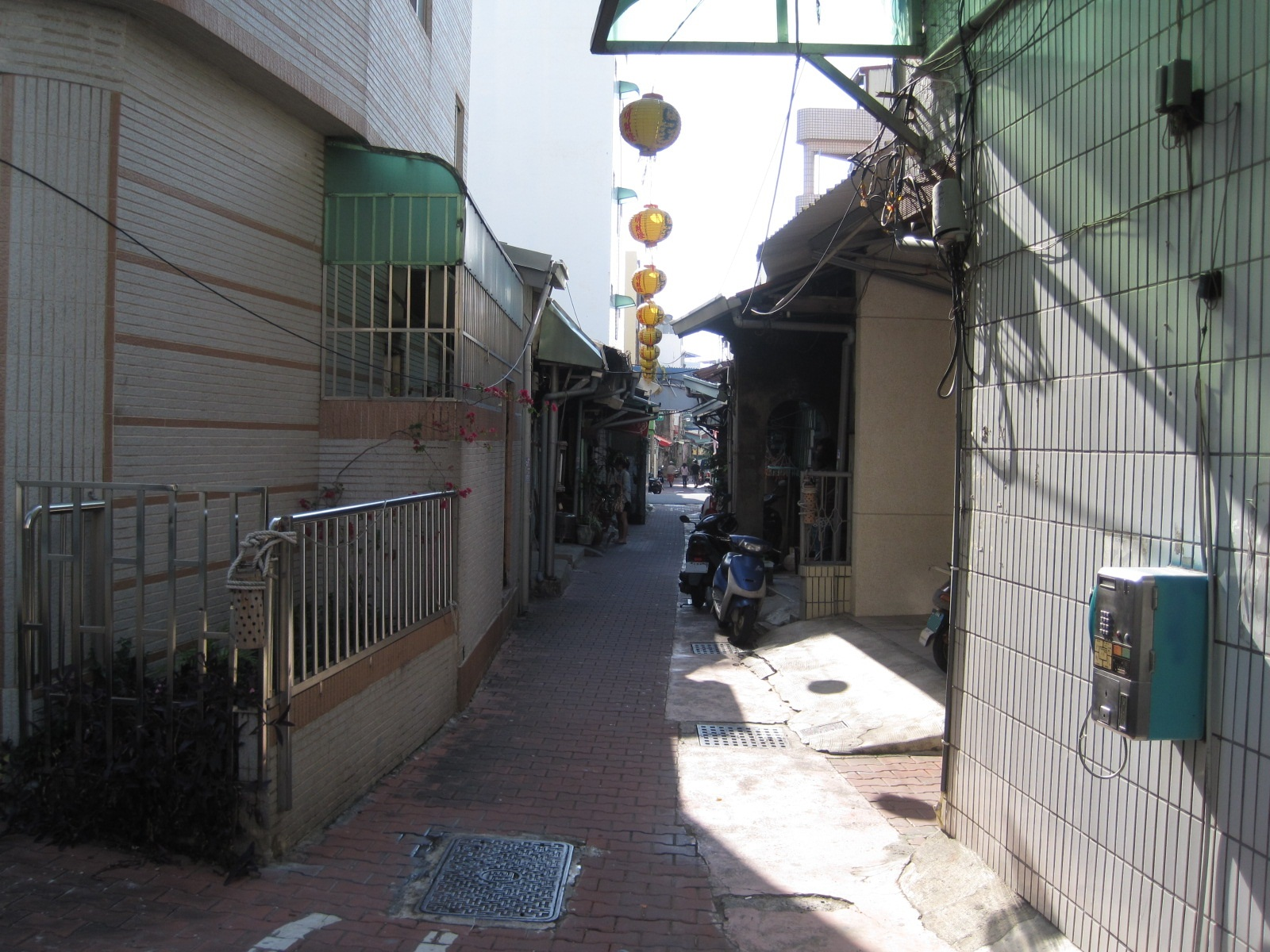 臺南市的總爺古街一景。